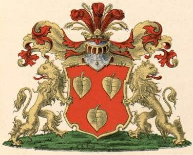 Koskulli suguvõsa krahvivapp